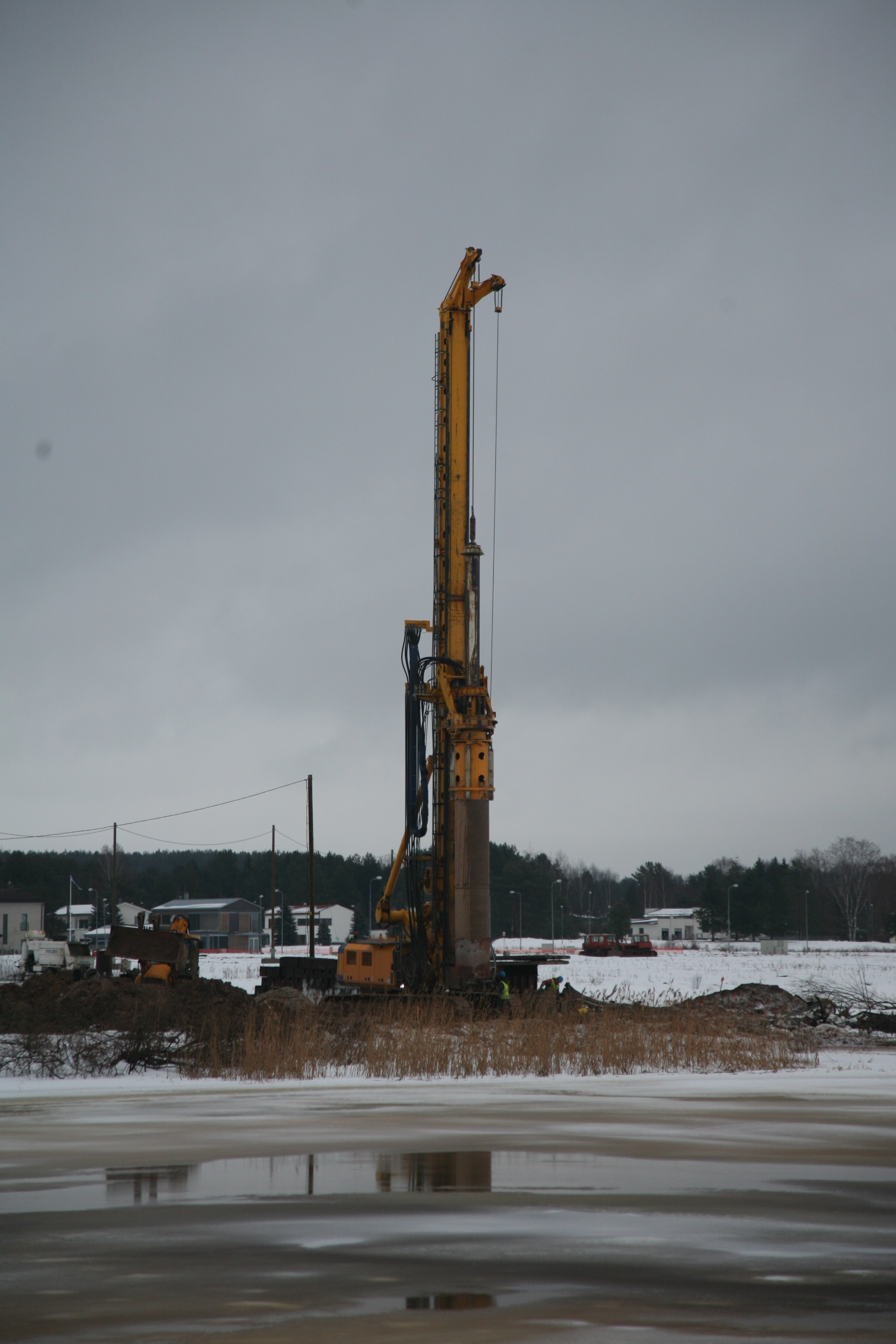 Puurvaiade puurimine Emajõe silla ettevalmistustöödel Tartu Idaringtee ehitusel, 1. veebruar 2013.